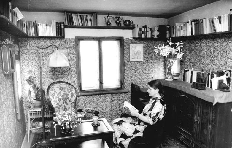 Naumburg, Wenzelsturm, Türmerin ADN-Deutsche Demokratische Republik 14.10.87 rü. Naumburger Impressionen Angelika Thee ist eine "hohe" Frau. Die ehemalige OP-Schwester arbeitet seit 1976 als Türmerin in der Stadtkirche St. Wenzel in Naumburg. Ihre Wohnng befindet sich in 67 Meter Höhe. Der Besucher muß 242 Stufen einer engen Wendeltreppe emporsteigen, vorbei an der Türmerwohnung, will er von der Aussichtsplattform den Blick über die fast 1000jährige Stadt und ihre reizvolle Umgebung genießen. Angelika Thee bewältigt dieses Pensum täglich. Sie ist die 36. Türmerin seit 1513. Im Gegensatz zu ihren Amtsvorgängern früherer Jahrhunderte muß sie nicht mehr die Stadttore überwachen, Feuerbrünste und nahende Feinde melden oder die Turmuhr aufziehen. Frau Thee überwacht den Gang der elektrischen Uhr, besorgt Handwerker für notwendige Reparaturen, läutet die Glocke für die Kirchengemeinde. Gästen weist sie den Weg zur Aussichtsplattform und berichtet ihnen auch gern über die wechselvolle Geschichte Naumburgs. Ein elektrisch betriebener Aufzug befördert alle Lasten freischwebend außen am Turm nach oben und unten. Das Treppensteigen aber nimmt ihr bei allen Komfort niermand ab. Reporter: Link Copyright-ADN-Zentralbild Berlin-DDR (siehe auch Fotos Nr. 1987-1008-307N-309N)